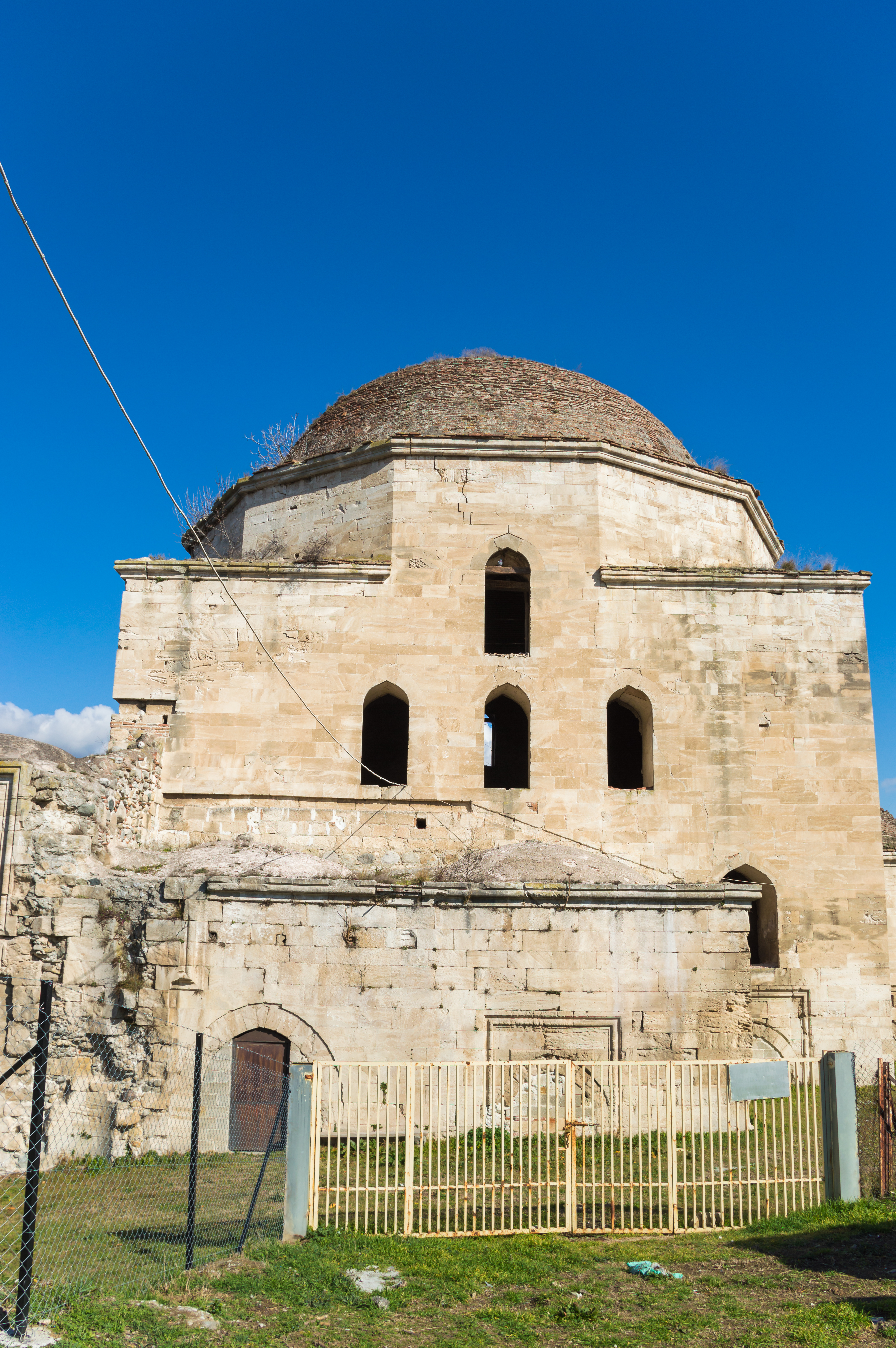 Τέμενος Μεχμέτ Μπέη, Σέρρες«Τέμενος Μεχμέτ Μπέη, Σέρρες»